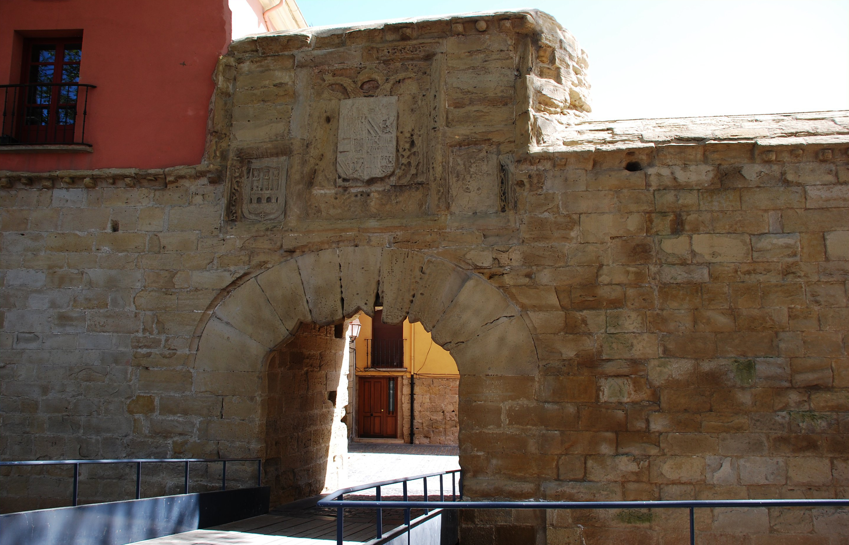 Arco del Revellín en la muralla de Logroño (La Rioja - España)